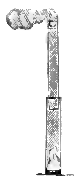 Ilustracja ze "Słownika ilustrowanego języka polskiego"